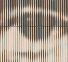 Ausschnitt eines Vectogramms von Heinrich Böll an der Fassade der Heinrich-Böll-Schule in Fürth im Odenwald.